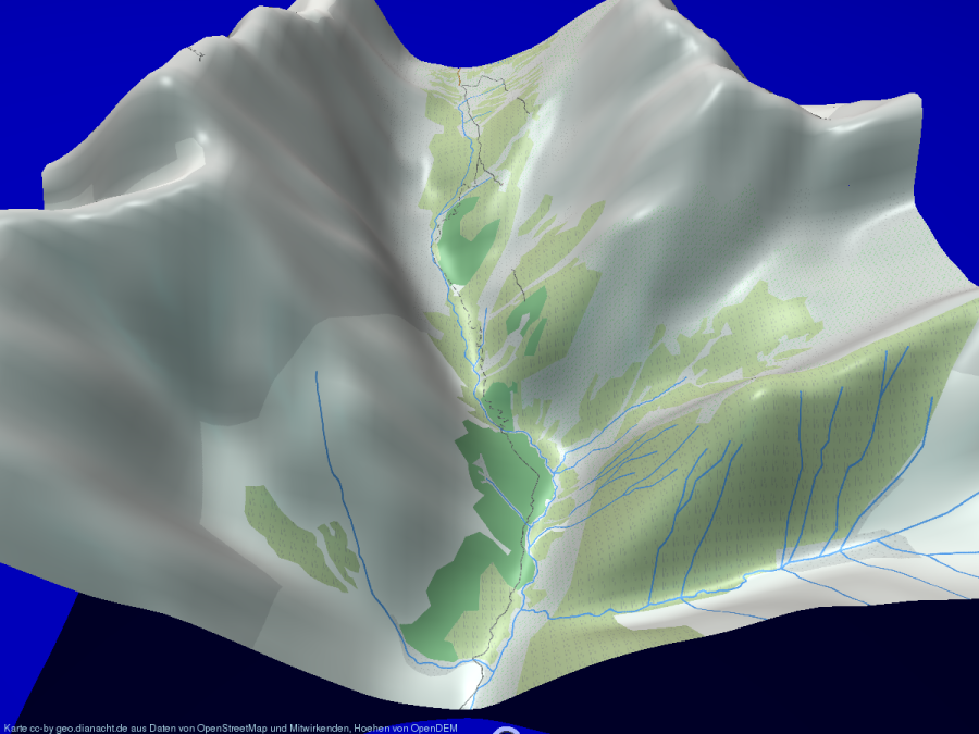 Vomper Loch (47.35N,11.52E) als Relief, Höhendaten von , Daten von OSM, gerendert mit